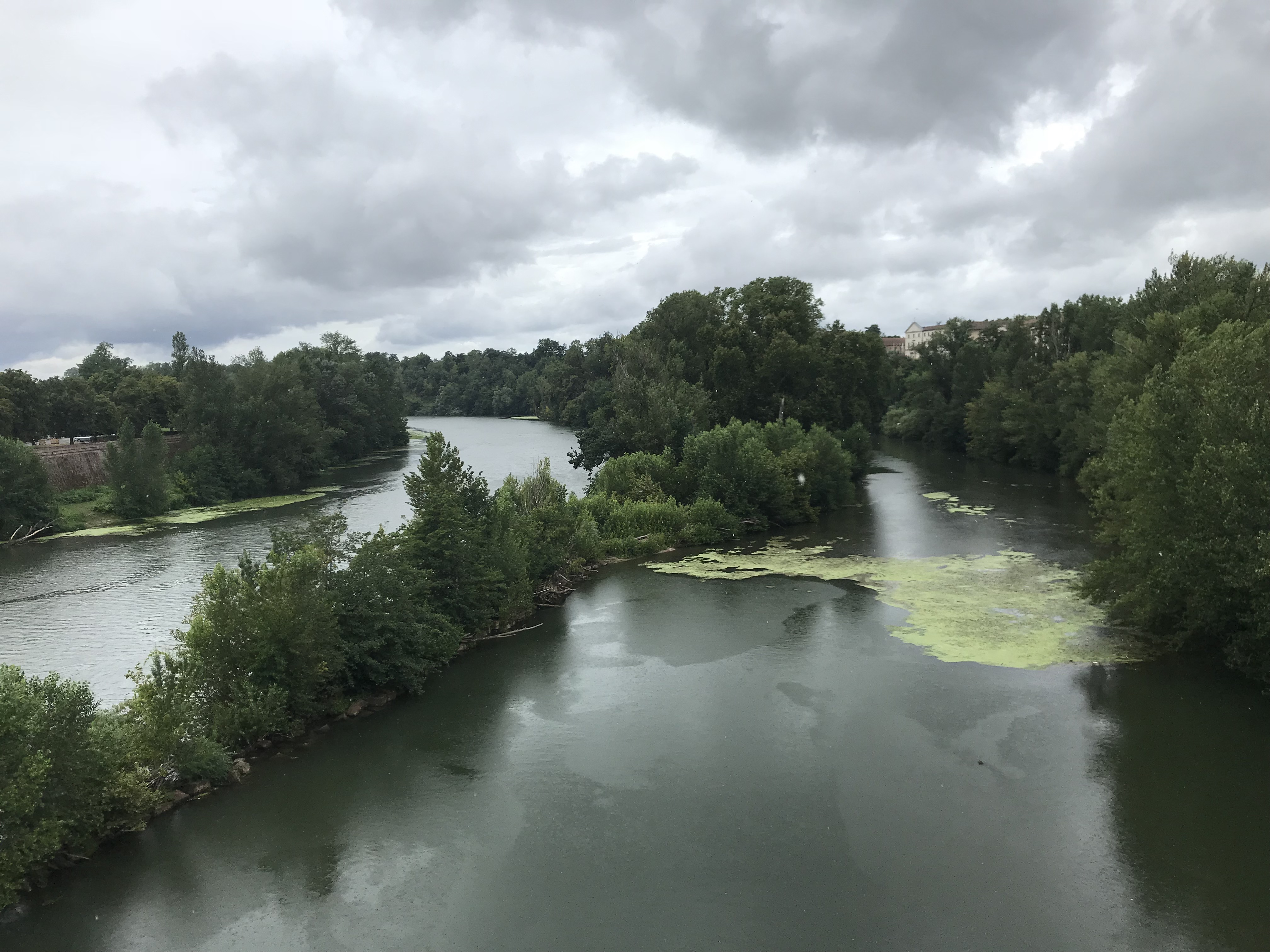 Le Tarn à Montauban